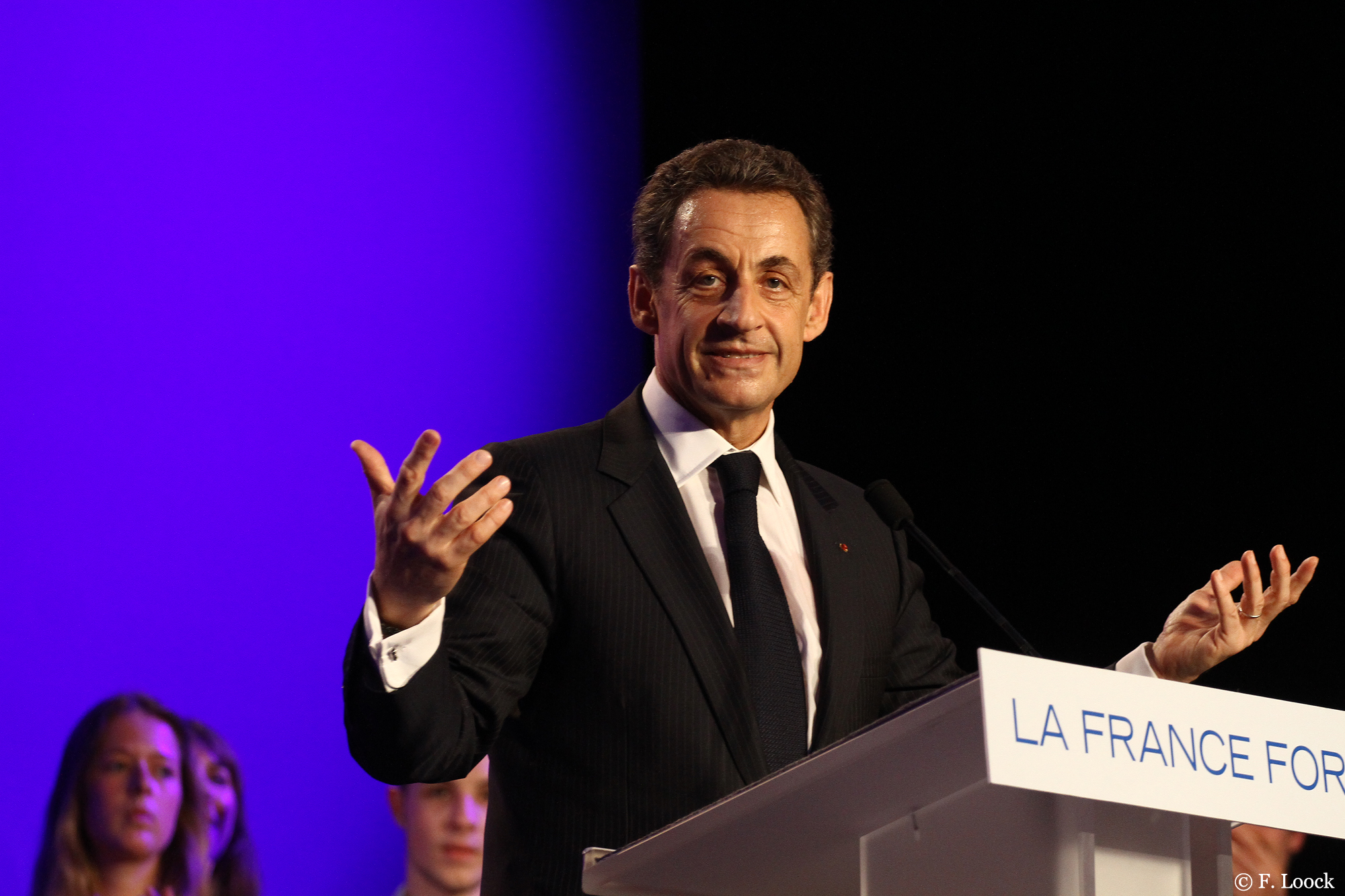 Meeting de Nicolas Sarkozy pour le 2° tour des élections présidentielles françaises au Raincy, Seine St Denis, France.